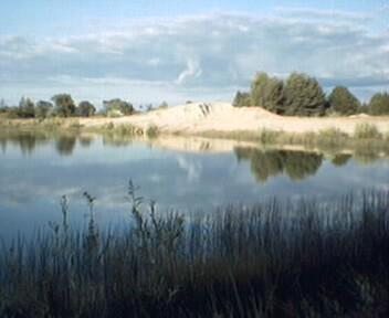 Derevnaya-Odirvanzi; Dragichin District.Brest Region.Belarus